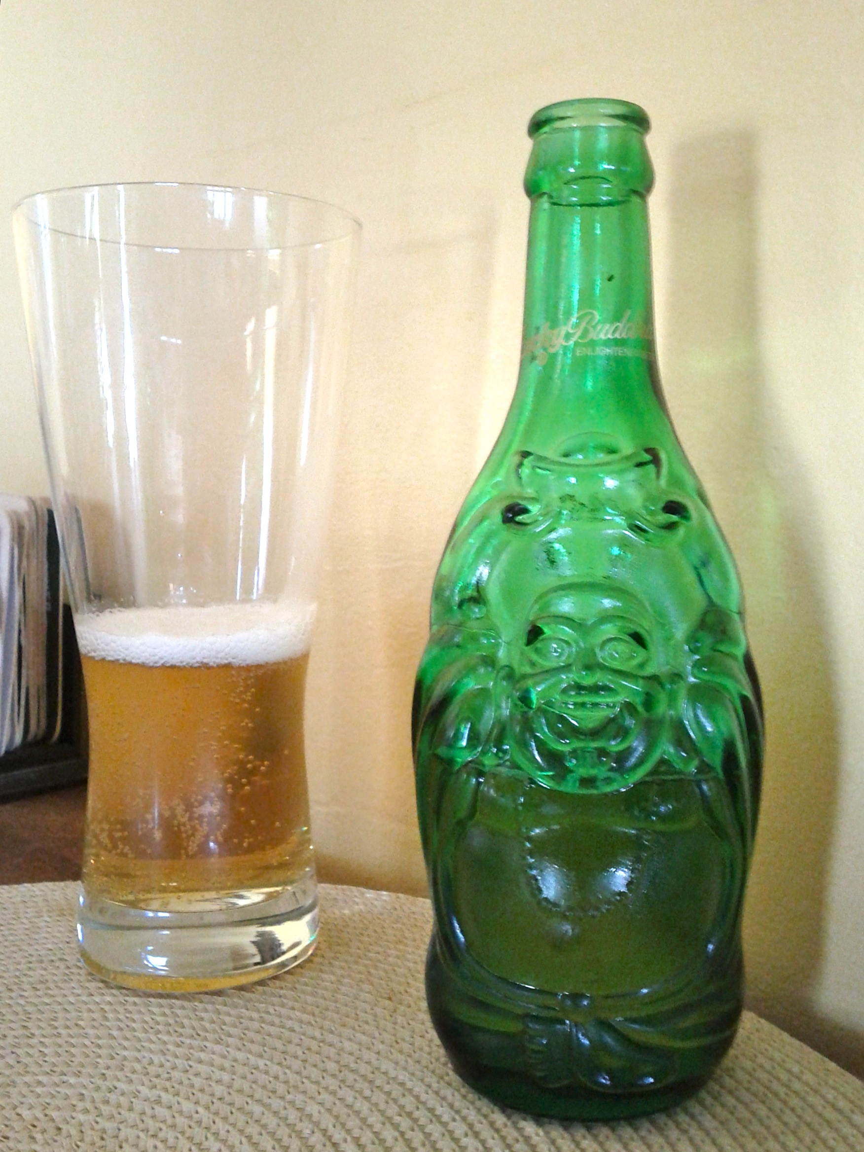 Buddha Beer